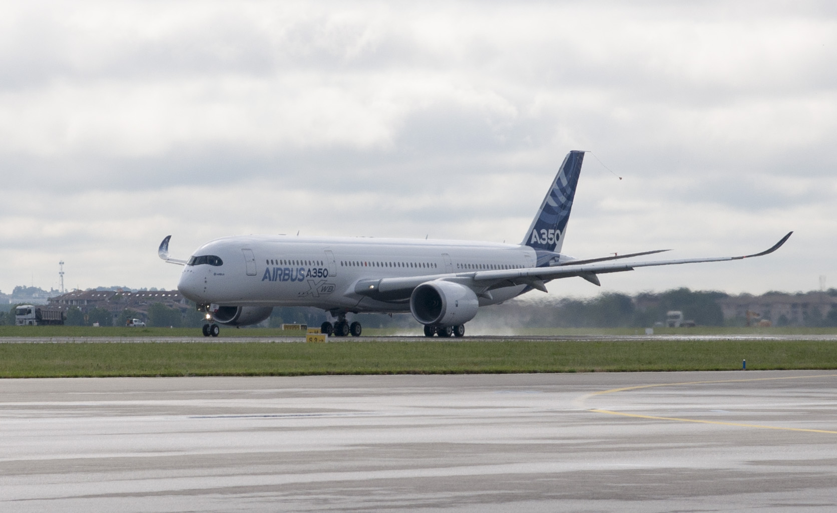 Décollage du premier exemplaire de l'A350, sur le site Airbus de Toulouse